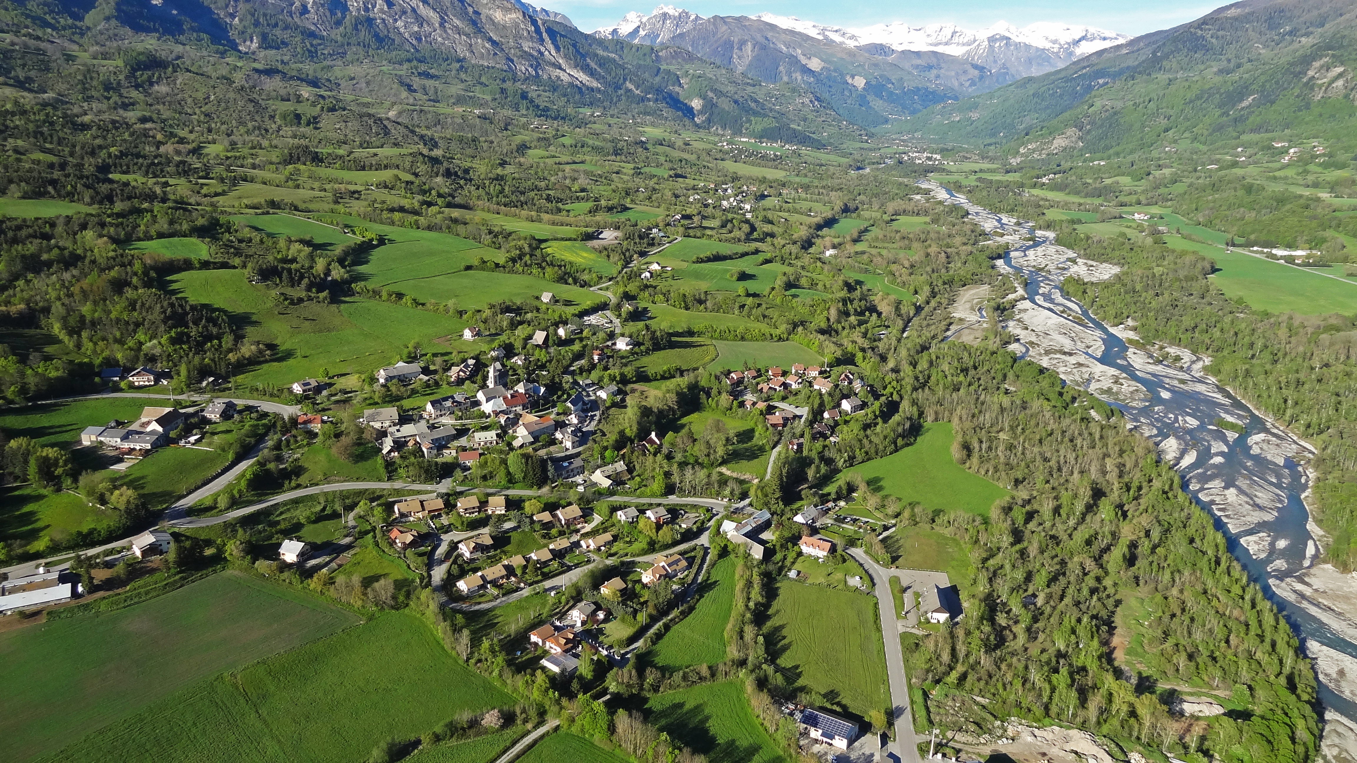 Commune de Chabottes département des Hautes Alpes